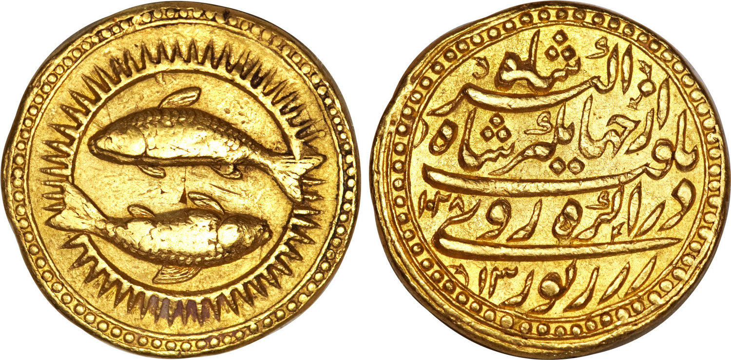 سکه یادبود طلای جهانگیر شاه گورکانی با نقش حوت